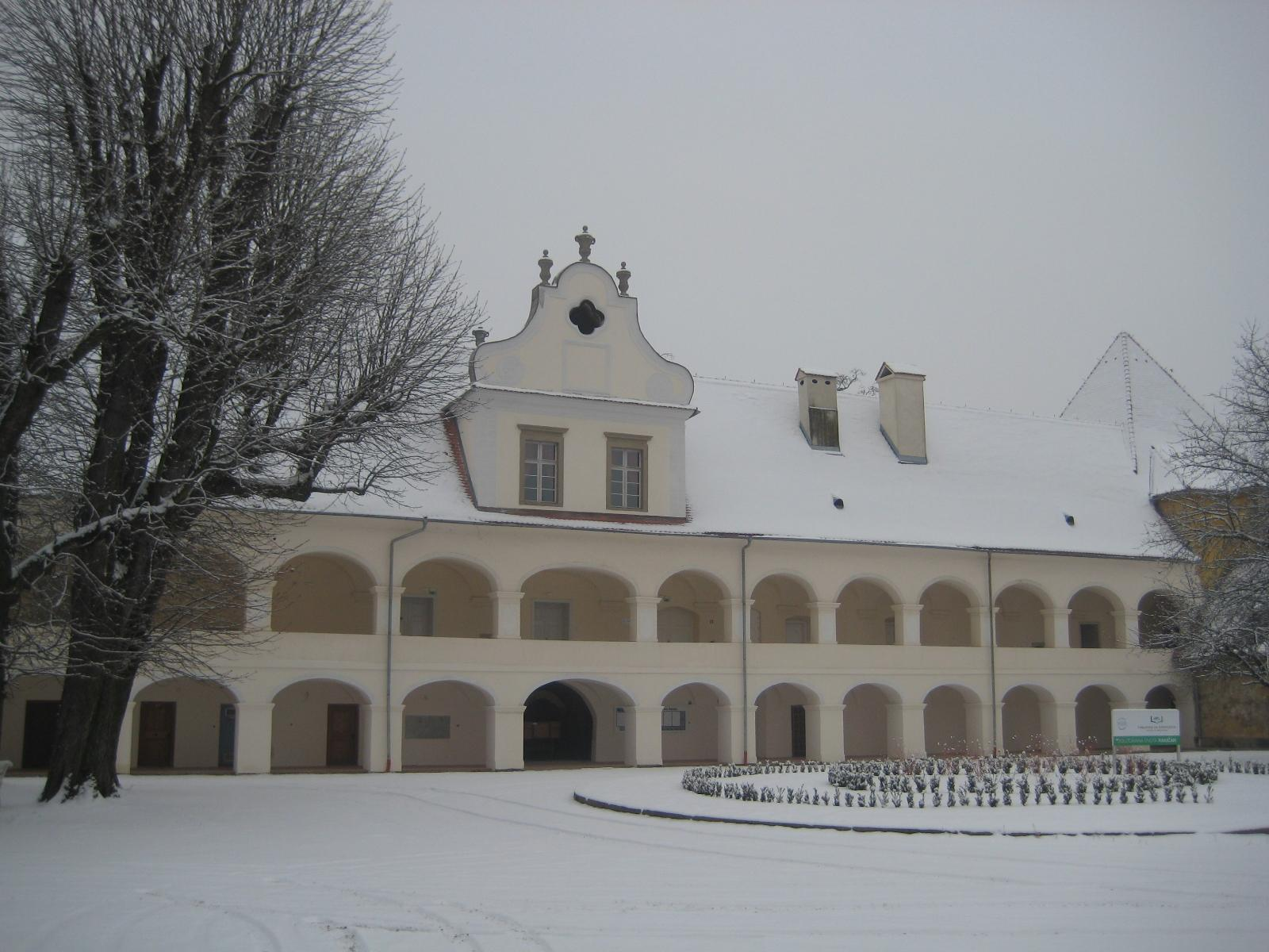 Rakičan castle, Slovenia